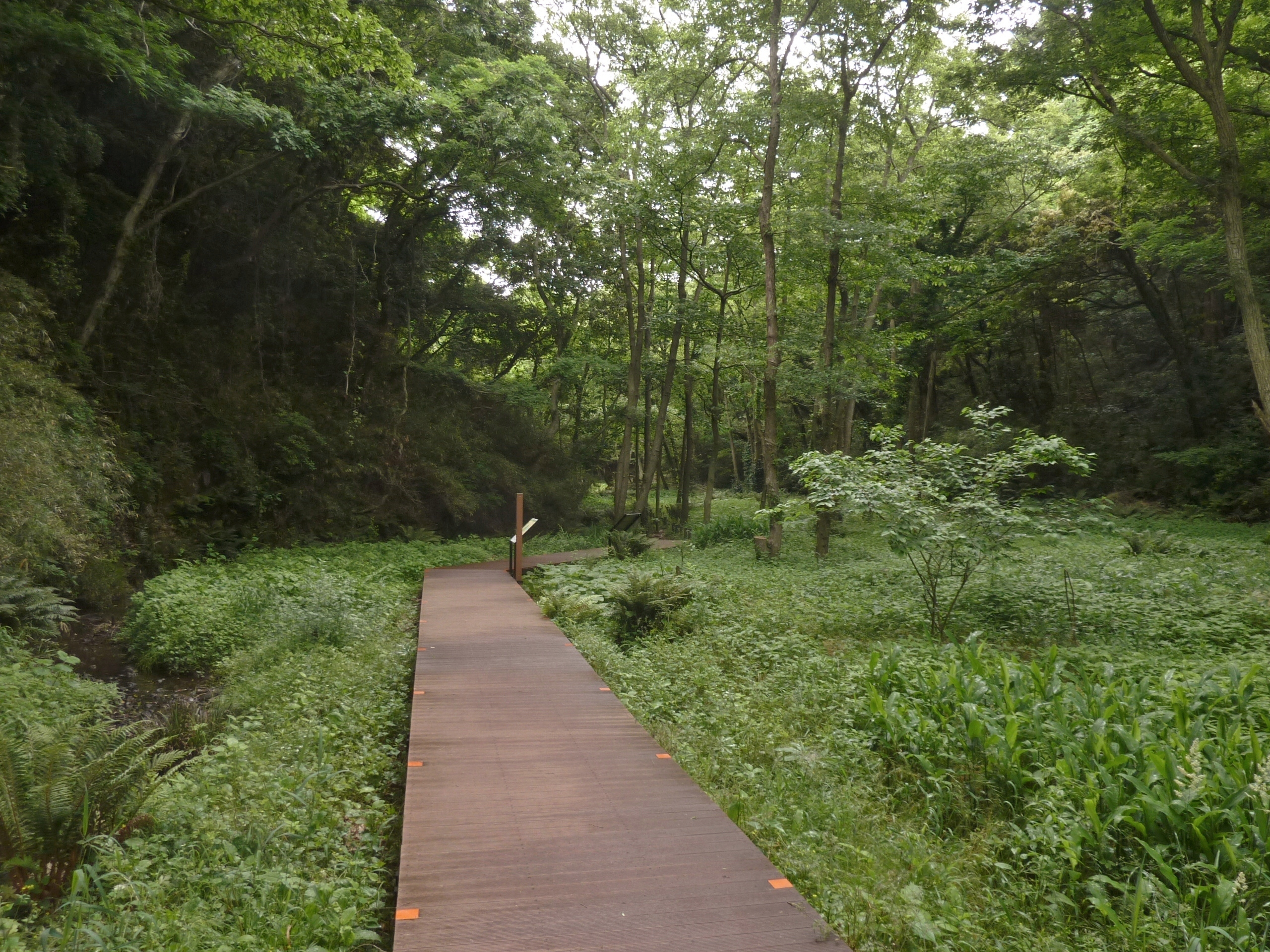 神奈川県三浦市・「小網代の森」浦の川上流域。川筋にハンノキの群落がある。